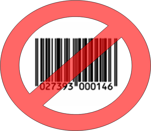 zelfgemaakt Streepjescode verbodsbord, afbeelding van streepjescode geplukt (niet copyrightable materiaal omdat het geen origineel werk is) en het verbodsbord eroverheen geplakt.